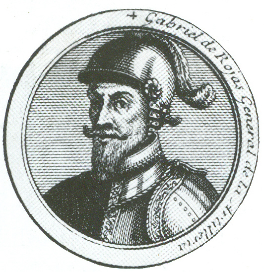 Retrato de Gabriel de Rojas y Córdova, natural de Cuéllar, conquistador español.